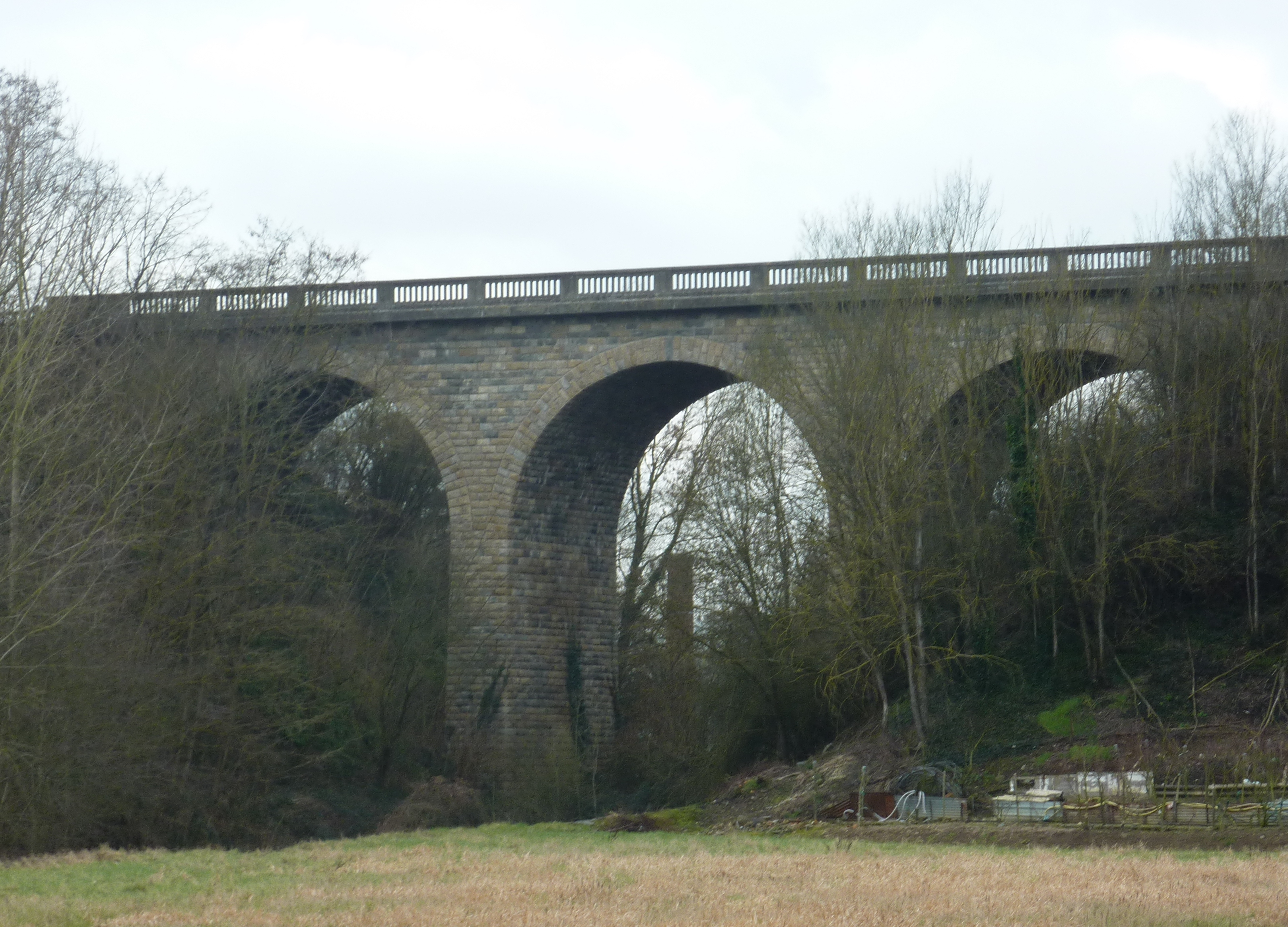 Vue d'ensemble